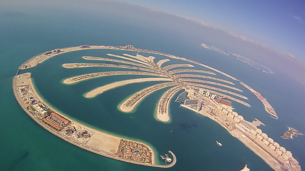 Dubai Wingsuit Flying Trip